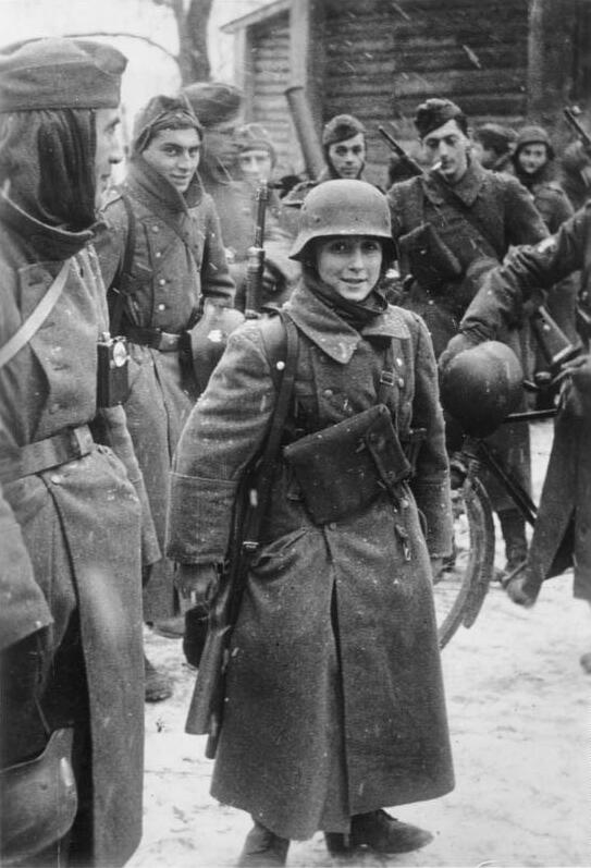 Scherl: An der Sowjetfront: Köpfe der im Osten eingesetzten französischen Legion. Léon M. ist mit seinen 15 Jahren der jüngste Soldat der Legion. Er ist in Tiflis geboren. 203-42